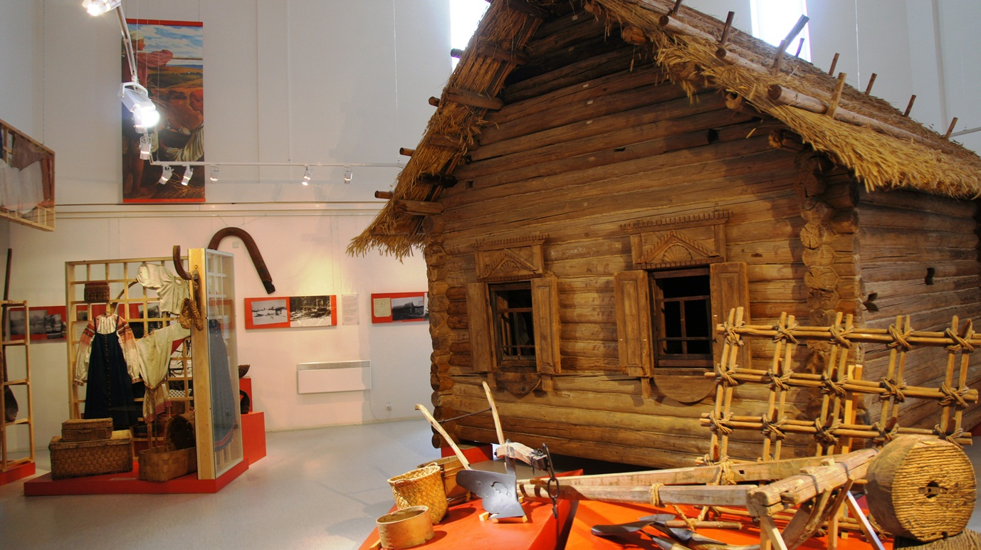 Музейно-выставочный комплекс музея-заповедника "Дмитровский кремль" экспозиция